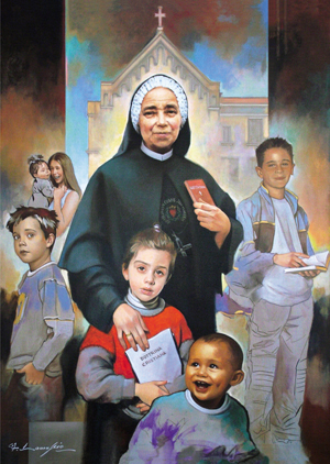 Beata Giulia Salzano, dipinto di Giuseppe Antonio Lomuscio